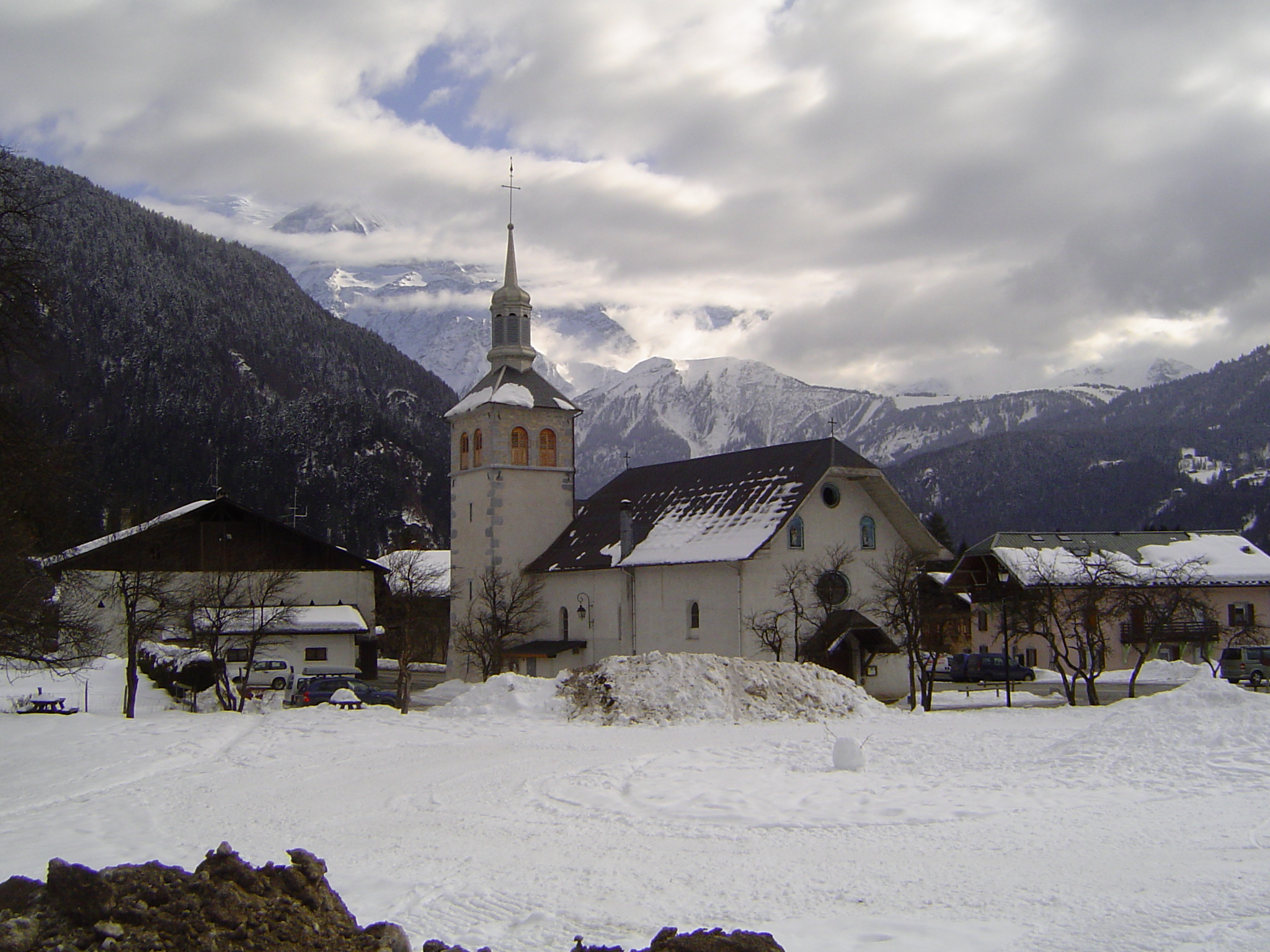 Photo prise dans la commune de Chamonix-Mont-Blanc en France